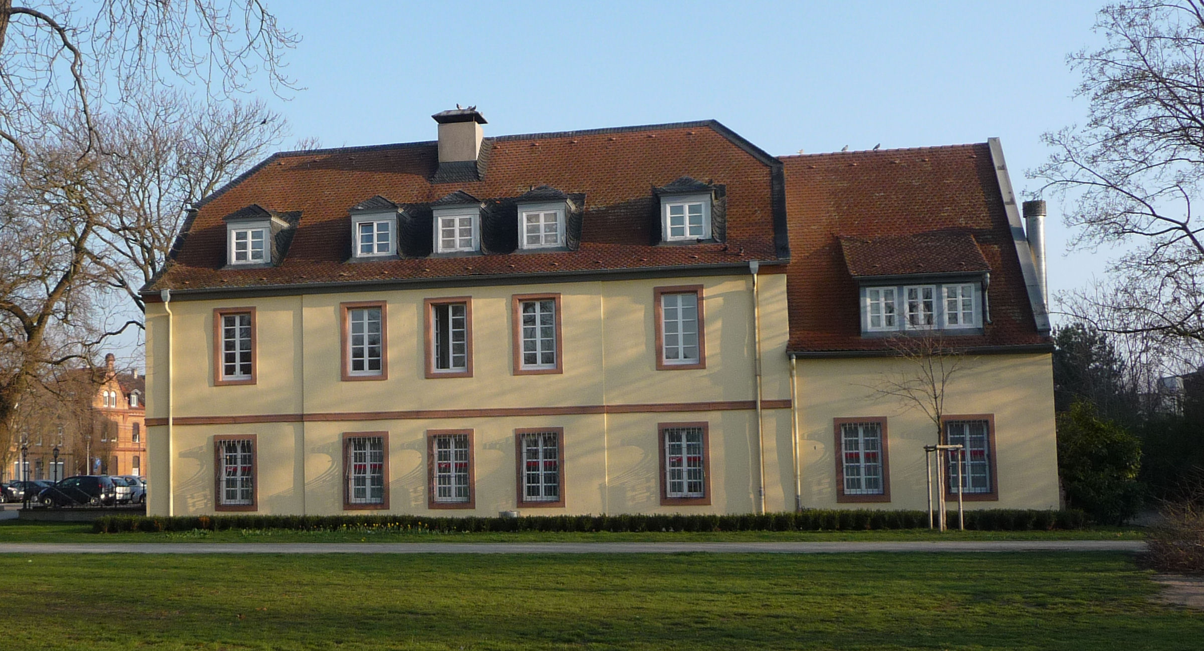 Ludwigshafen-Mundenheim, Rheingönheimer Straße 98: ehemaliges Herrenhaus der Freiherren von Zedtwitz